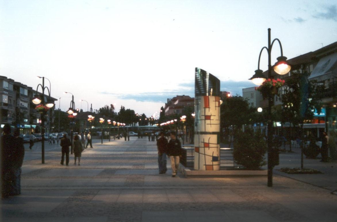 La Gran Vía constituye una especie de símbolo reciente de la ciudad de Majadahonda. Fotografía tomada al anochecer. Autor: Fev. Año 2002